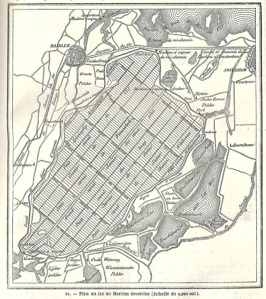 Plan des polders du lac de Haarlem vers 1870